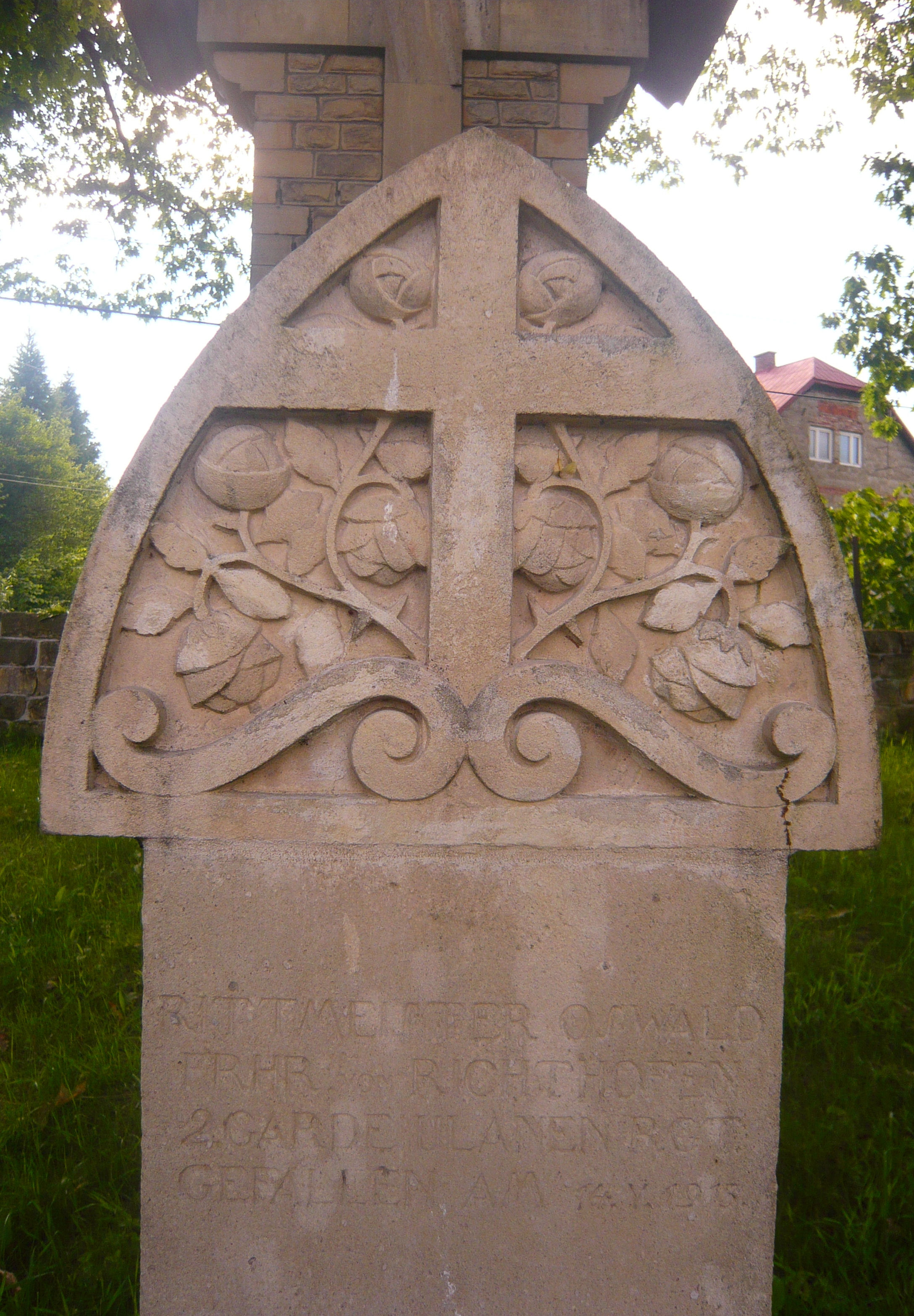 Cmentarz wojenny nr 138 - Bogoniowice - nagrobek Oswalda von Richtofena